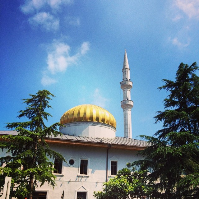 Batumi Mosque in 2014